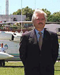 Álvaro Ramos Trigo